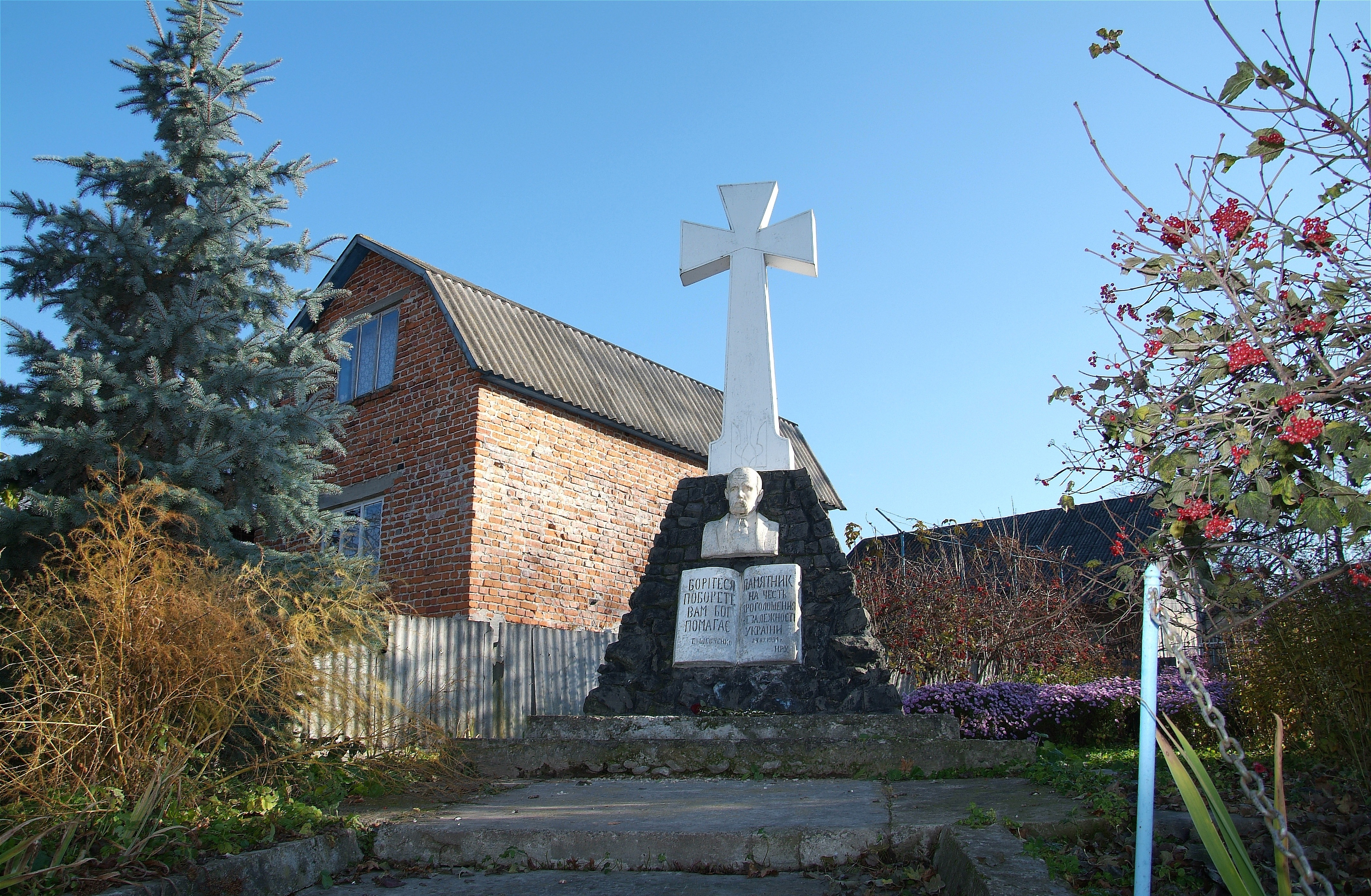 Пам'ятник поету, письменнику, художнику Шевченку Тарасу Григоровичу, село Сільце